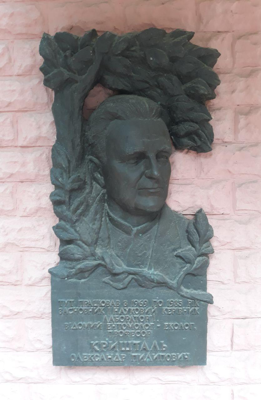 Пам'ятна дошка Олександру Кришталю при вході до Інституту біології та медицини КНУ